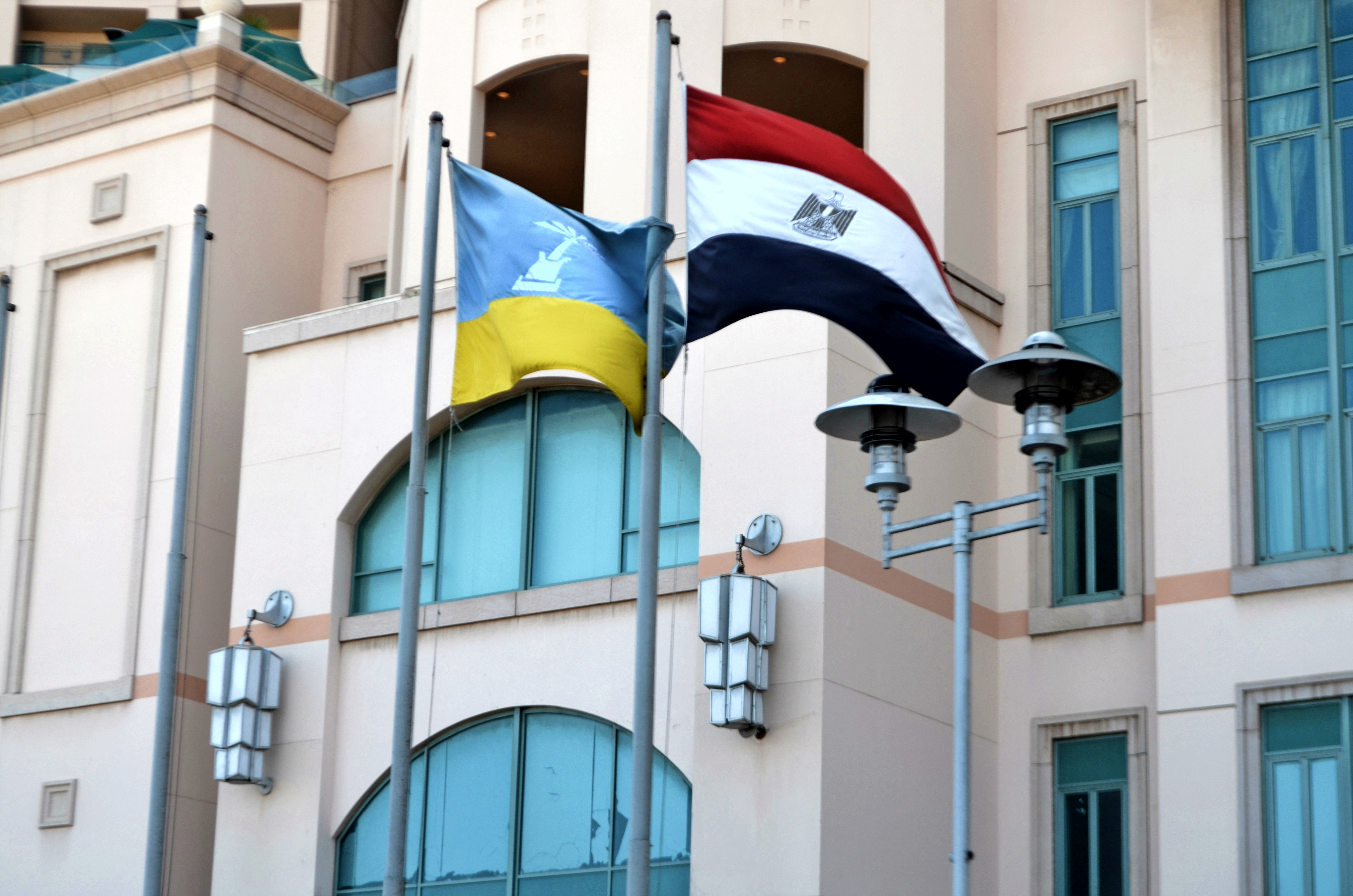 علم مصر وعلم محافظة الإسكندرية، سان ستيفانو، الإسكندرية